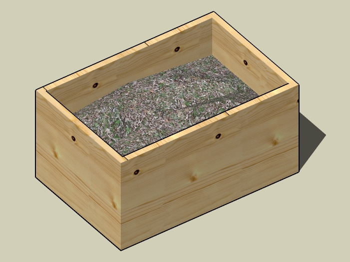 Darstellung einer Wurmkiste zur Herstellung von Wurmkompost